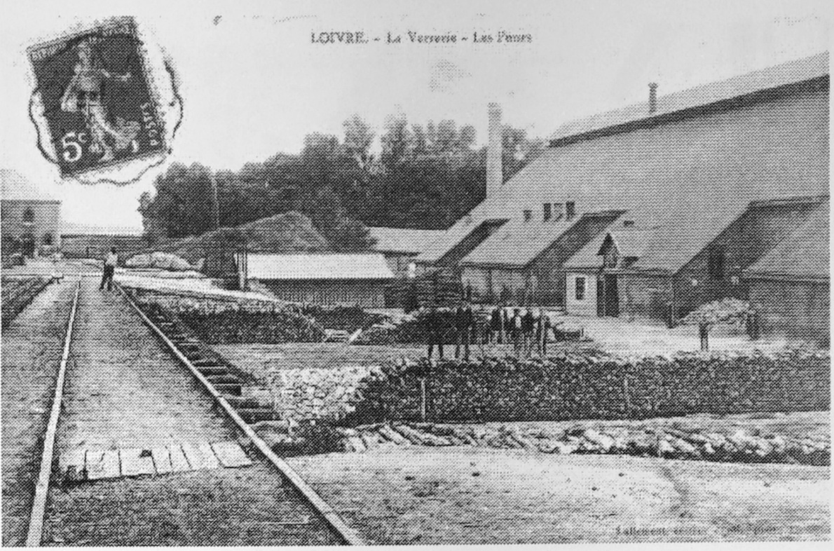 sur une vue ancienne.